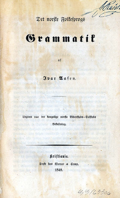 Tittelside til Det norske Folkesprogs Grammatik av Ivar Aasen